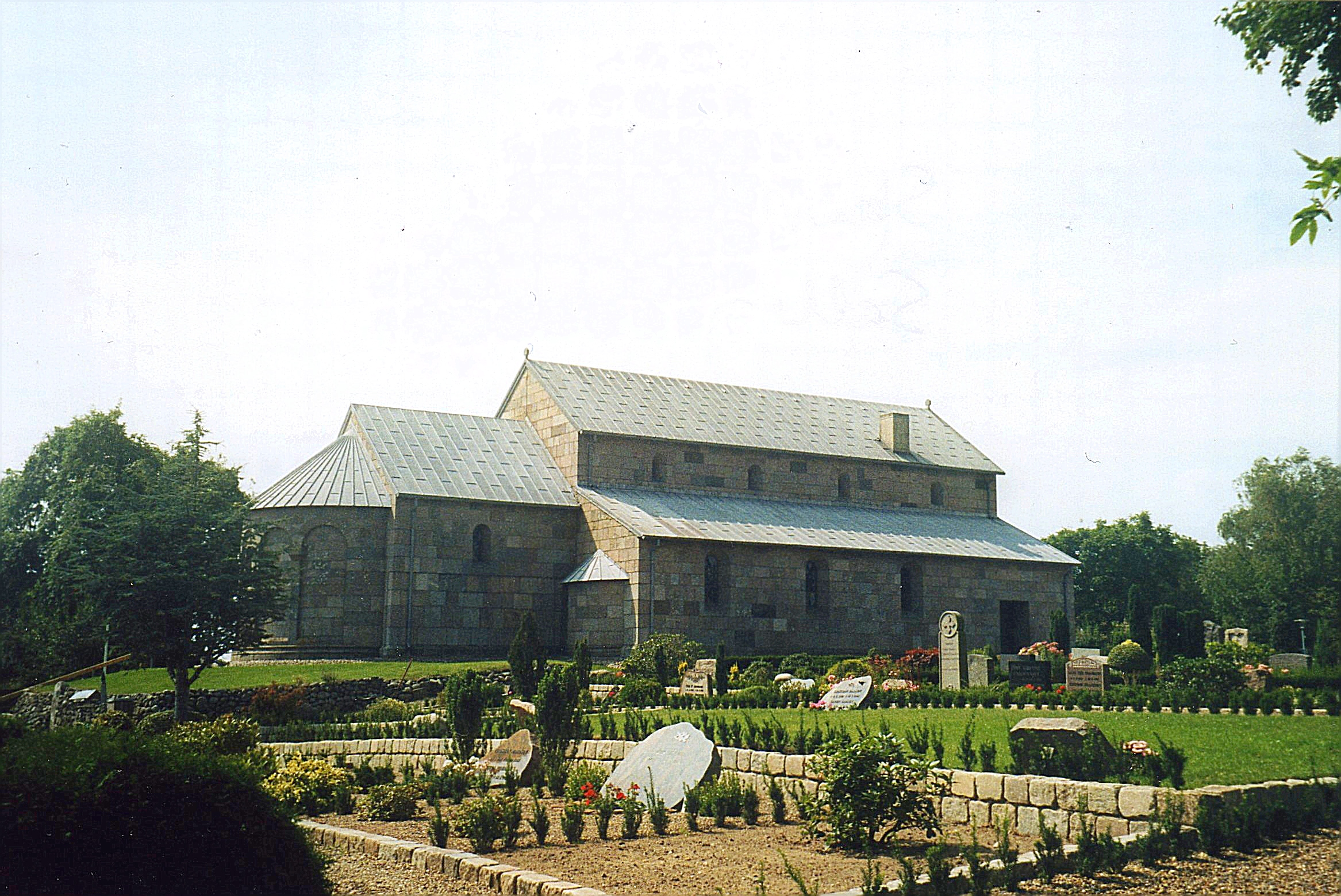 Salling Kirke, Salling Sogn, Vesthimmerlands Kommune